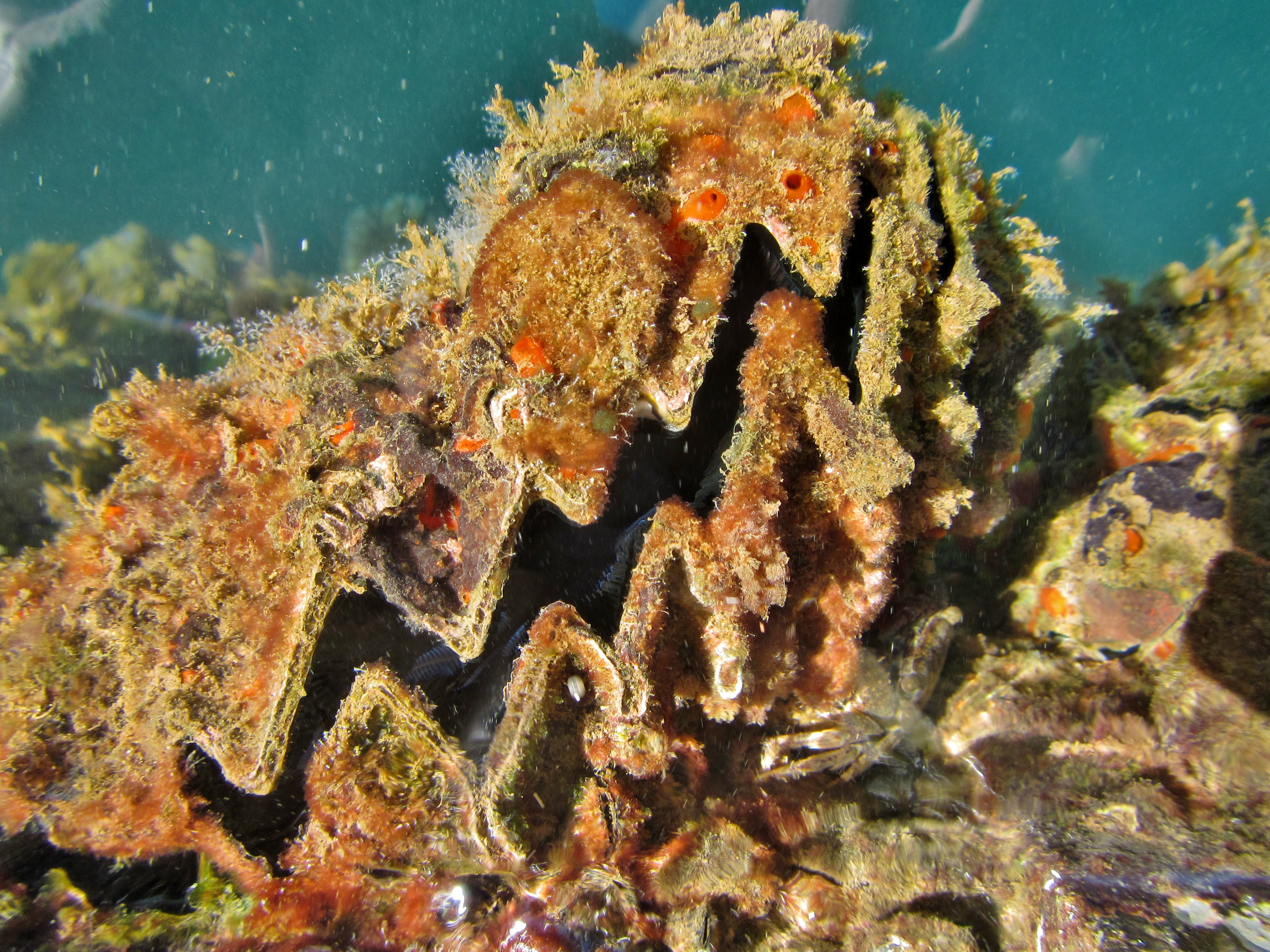 Une huître Hyotissa hyotis au ponton de l'embarcadère de Mamoudzou, à Mayotte.